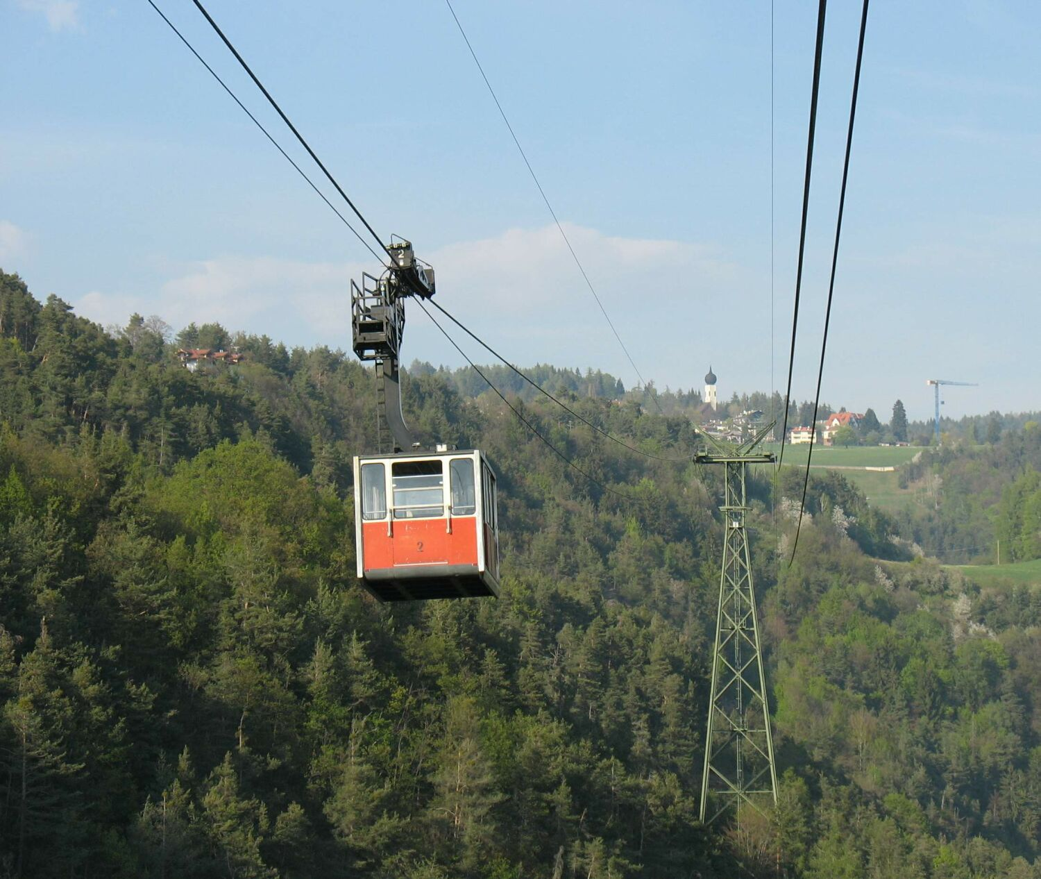 Vecchia cabina della funivia del Renon - estate 2007